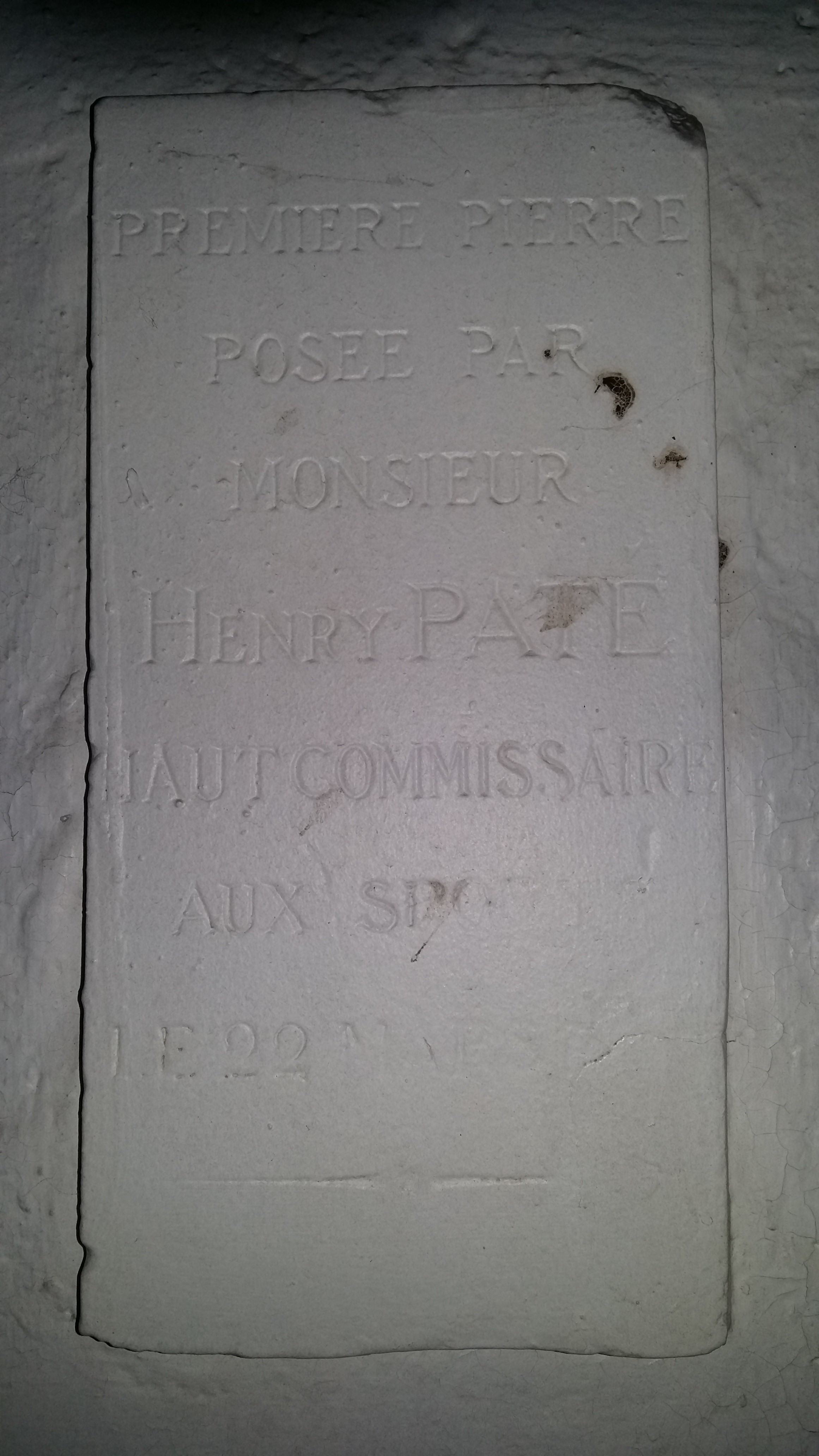 Nous pouvons lire le texte suivant : PREMIERE PIERRE POSEE PAR MONSIEUR HENRY PATE HAUT COMMISSAIRE AUX SPORTS LE 22 MARS (année effacée, probablement 1924).